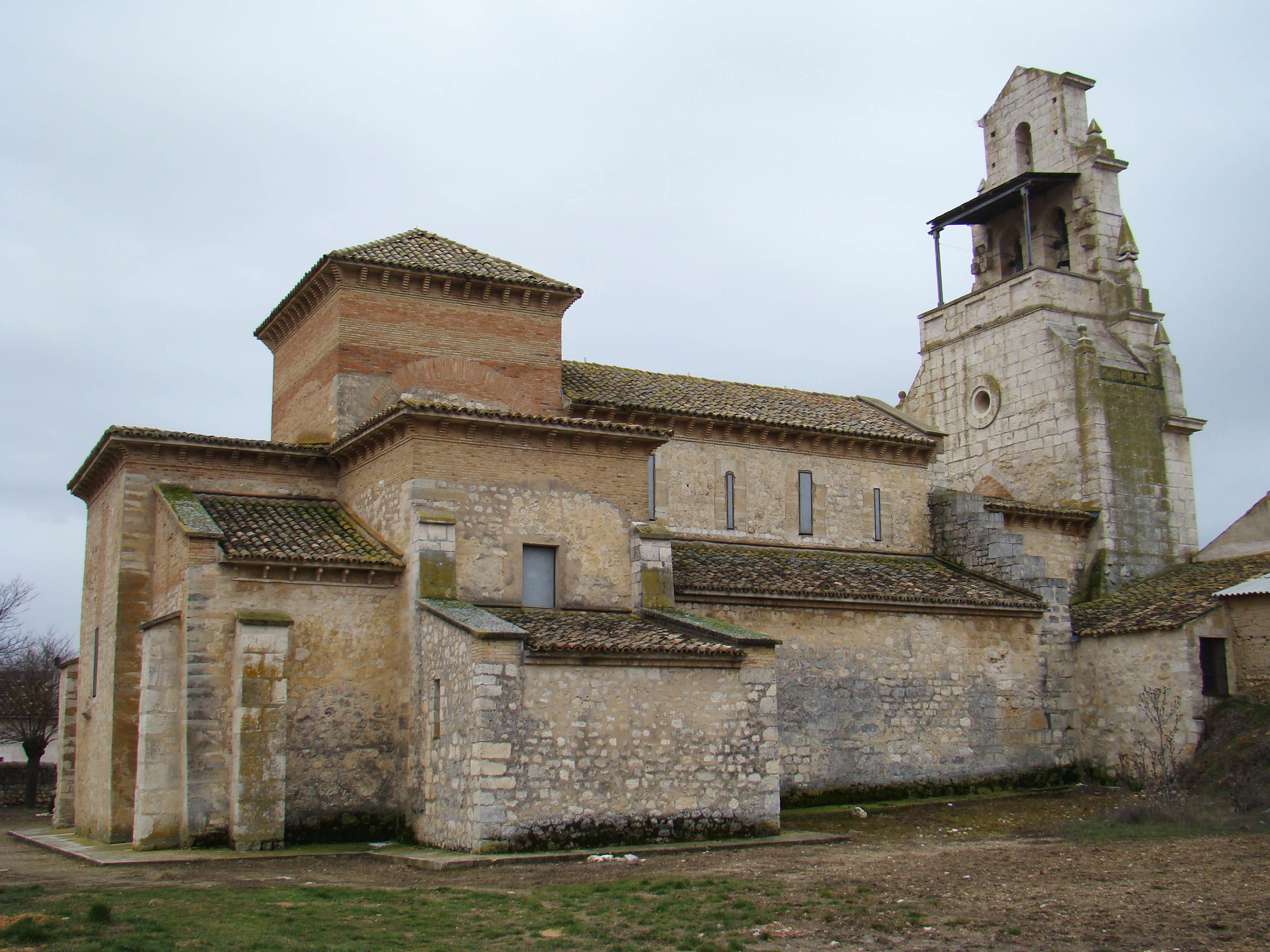 Iglesia mozárabe de San Cebrián en la localidad de San Cebrián de Mazote, Valladolid, España. Vista del edificio.